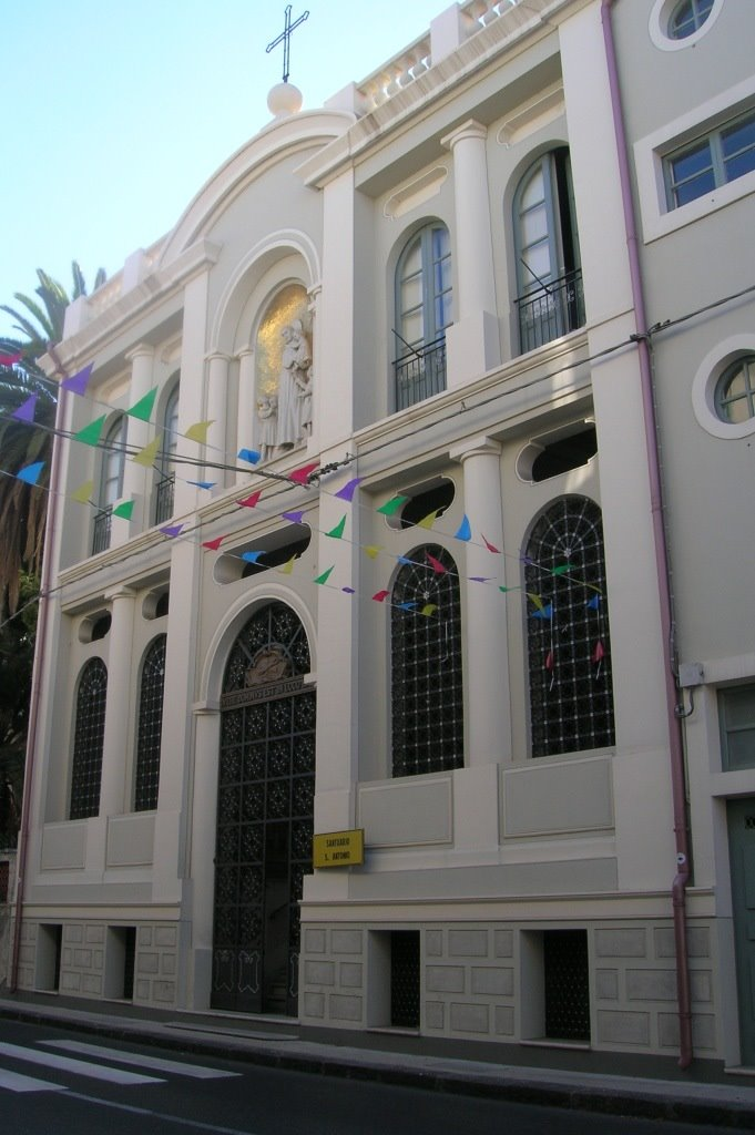 santuario Sant'Antonio. Esterno.